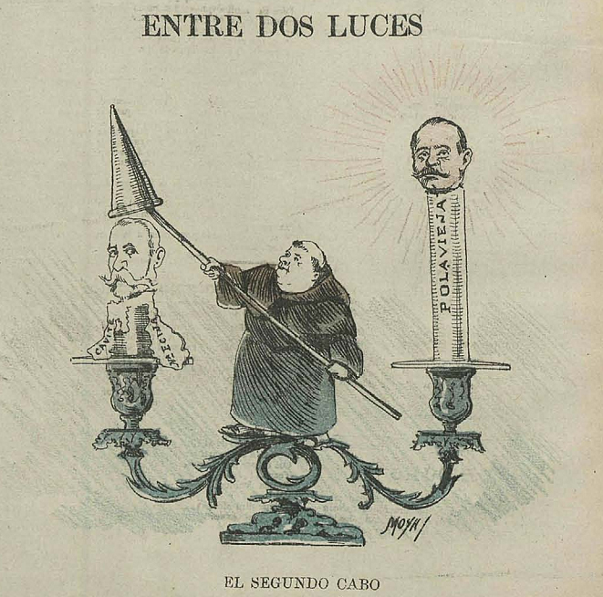 Entre dos luces, en la revista satírica española Gedeón.